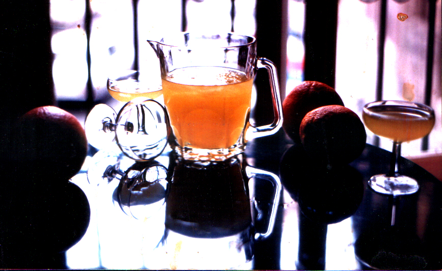 Jarra de Agua de Valencia, copas y naranjas a contraluz, fotografiadas en la -Cerveceria Madrid por Manolo Gil en 1989.